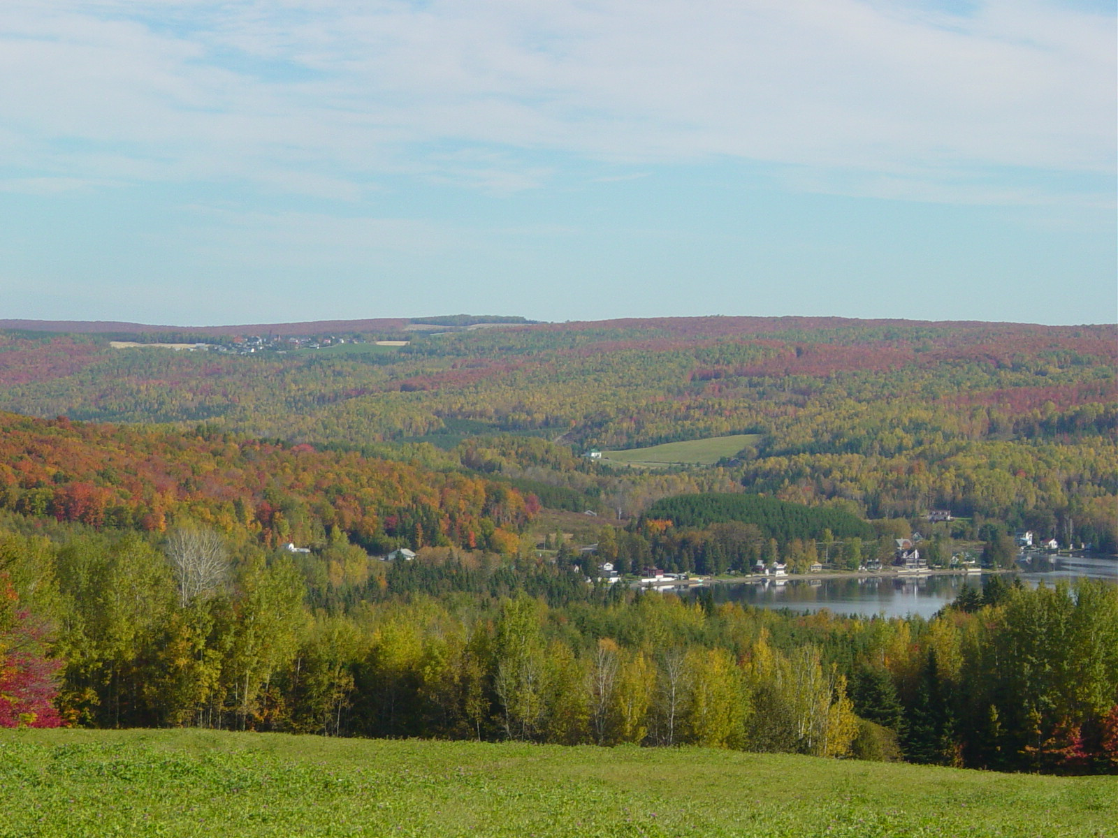 Village de Lejeune en automne(en haut à gauche) et Grands Lac Squatec. Lejeune est une municipalité dans la municipalité régionale de comté du Témiscouata au Québec (Canada), située dans la région administrative du Bas-Saint-Laurent.